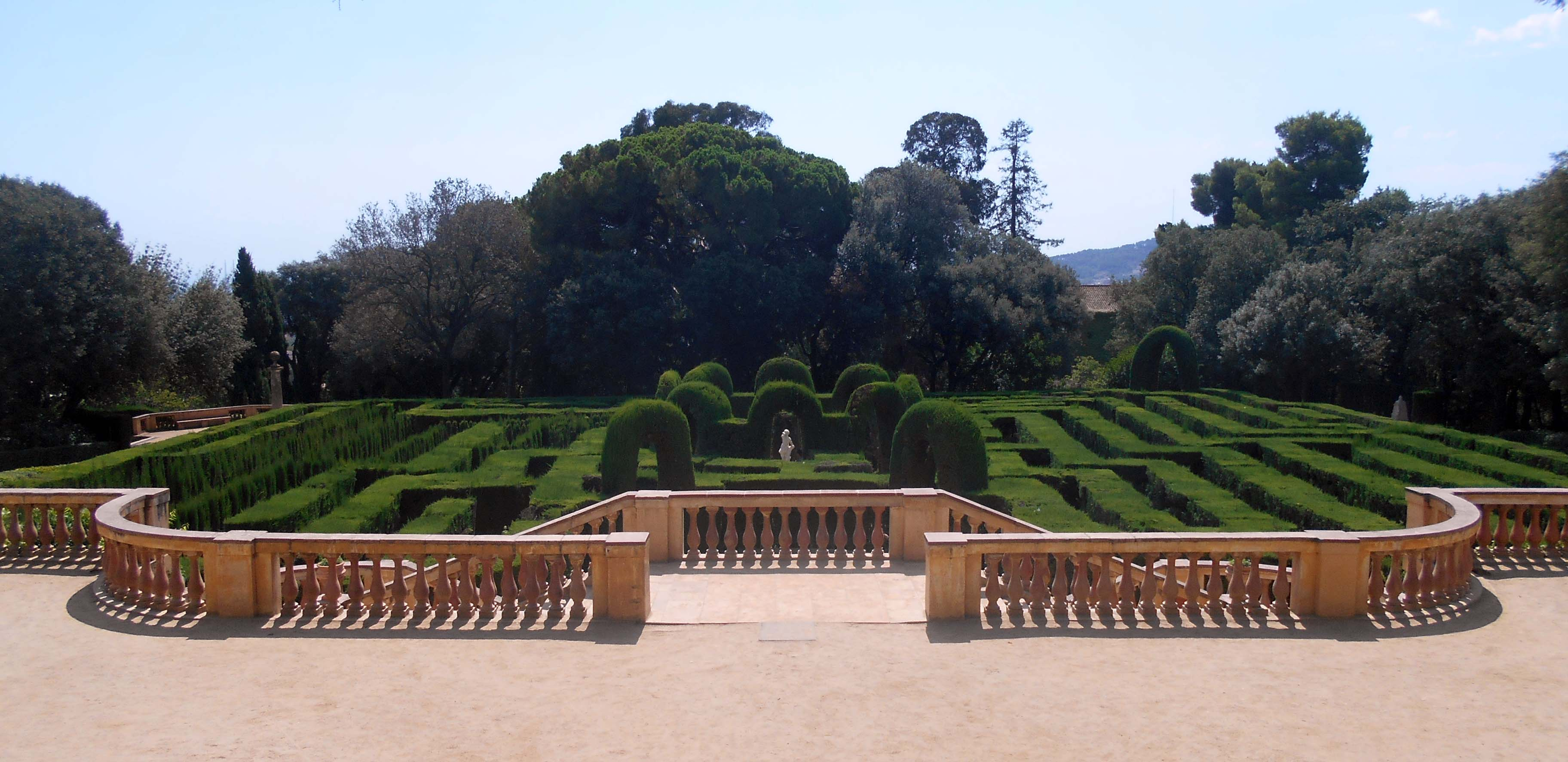 Laberinto de Horta.